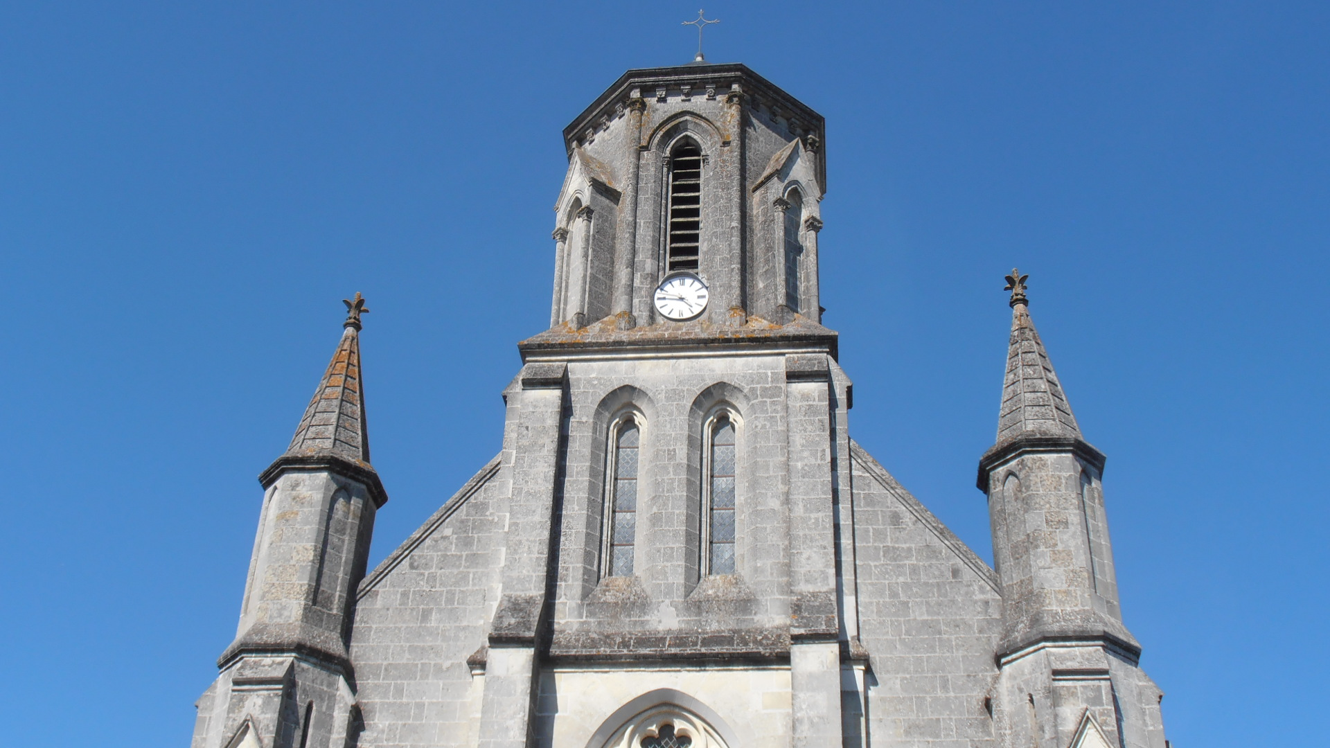 Détails de l'église de Saint-Laurent-du-Mottay (Maine-et-Loire, France).